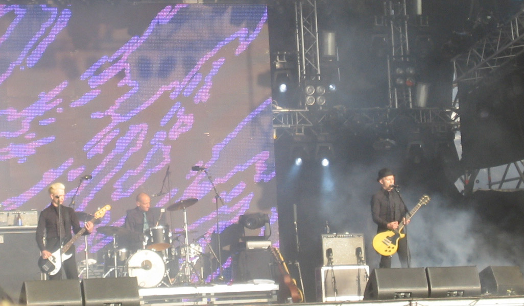 Zen Cafe, Raumanmeren juhannus 2006, Finland.